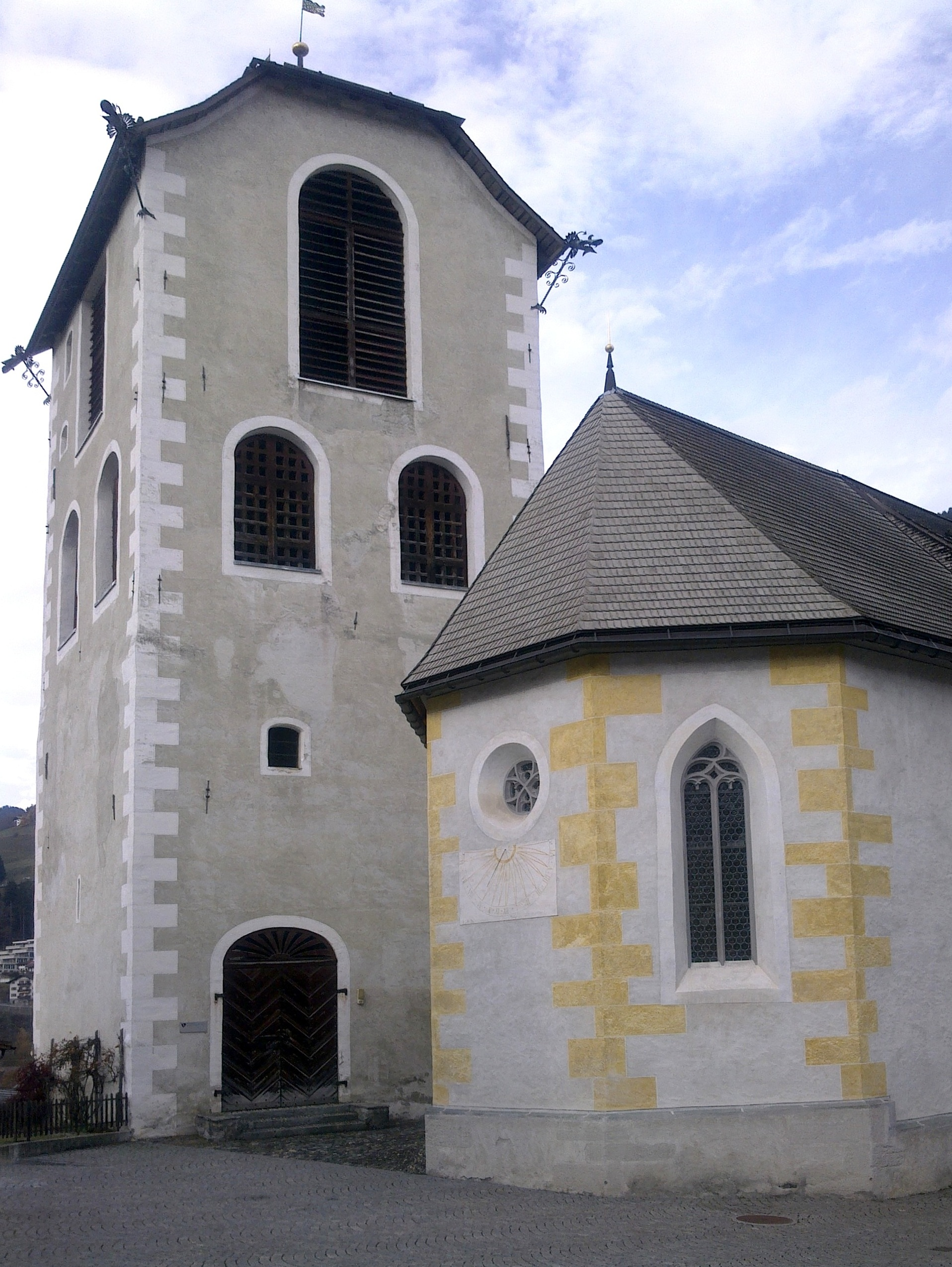 reformierte Kirche St. Margarethen in Ilanz mit Glockenturm